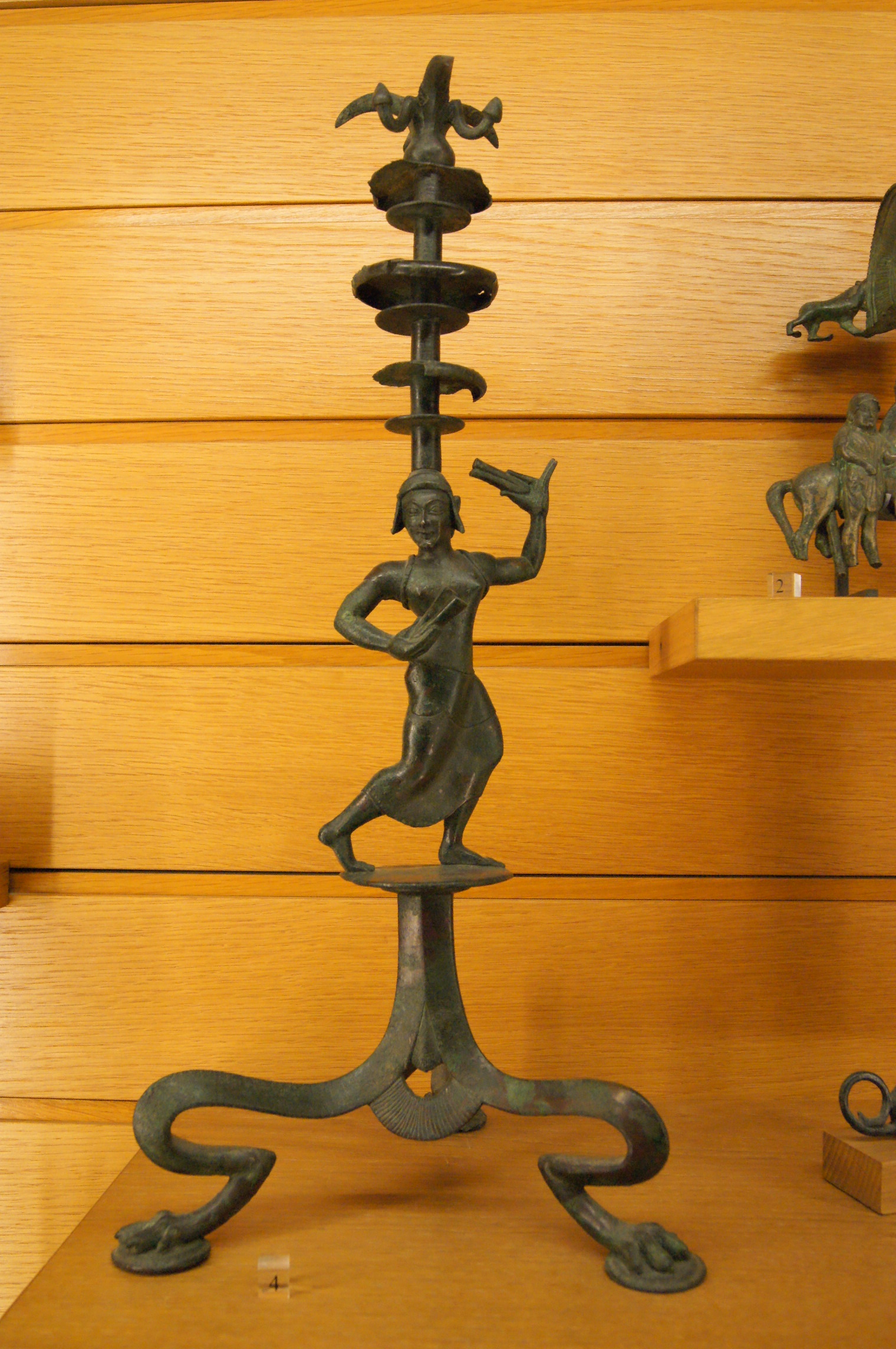 Chandelier en bronze, début du V ème S. av. JC. Référence MDL : Br 3145. (d'après le cartel du Louvre). Vitrine des éléments de mobilier archaïque en bronze, Département des antiquités étrusques et romaines, Musée du Louvre, aile Denon, niveau 0, salle 18. Localisation : 48° 51′ 40″ Nord 2° 20′ 09″ Est.